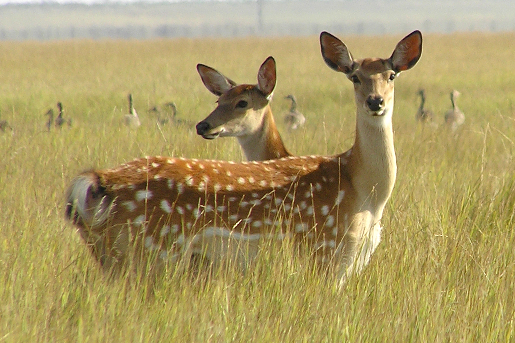 «Асканія-Нова» ім. Ф.Е. Фальц-Фейна, Чаплинський район, смт Асканія-Нова, вул. Фрунзе,13